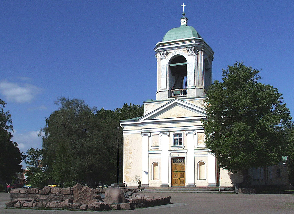 Кирха Петра и Павла (Санкт-Петербург и Лен.область, Выборг, Пионерская площадь, 6)